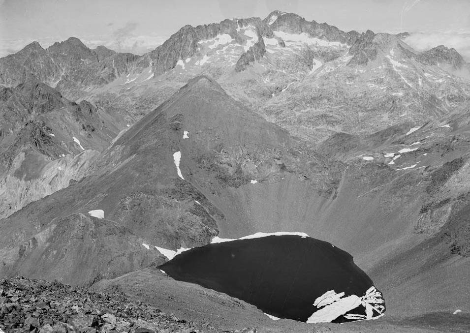 Imatge